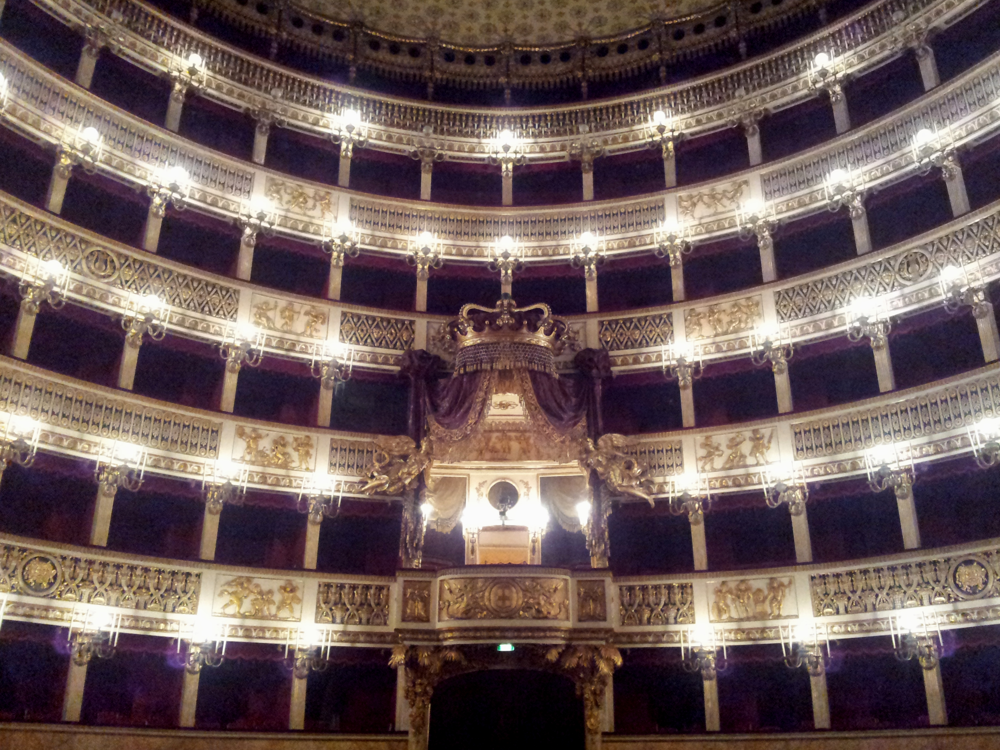 Il palco reale del Real Teatro di San Carlo di Napoli.